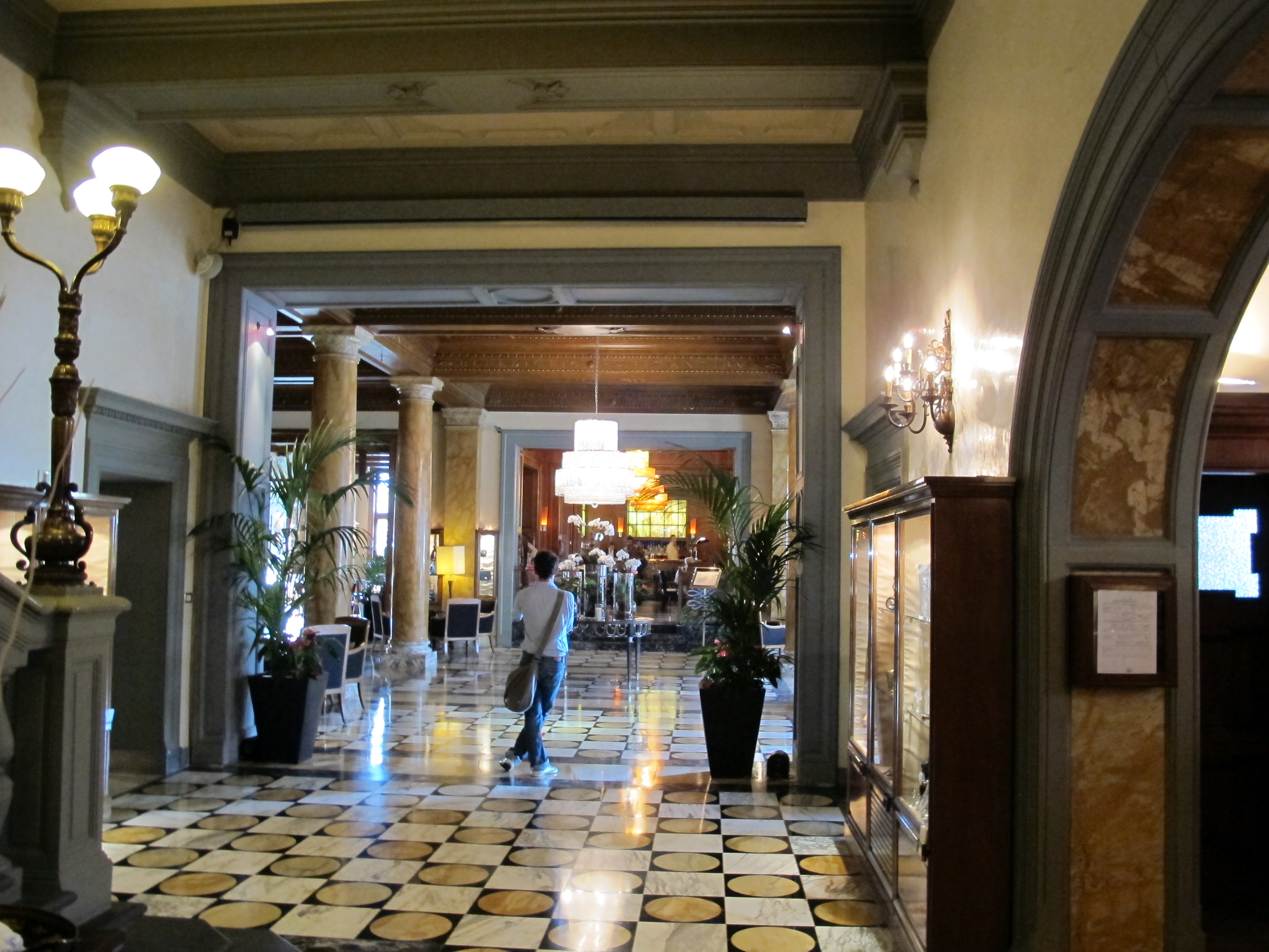 Hotel excelsior, interno